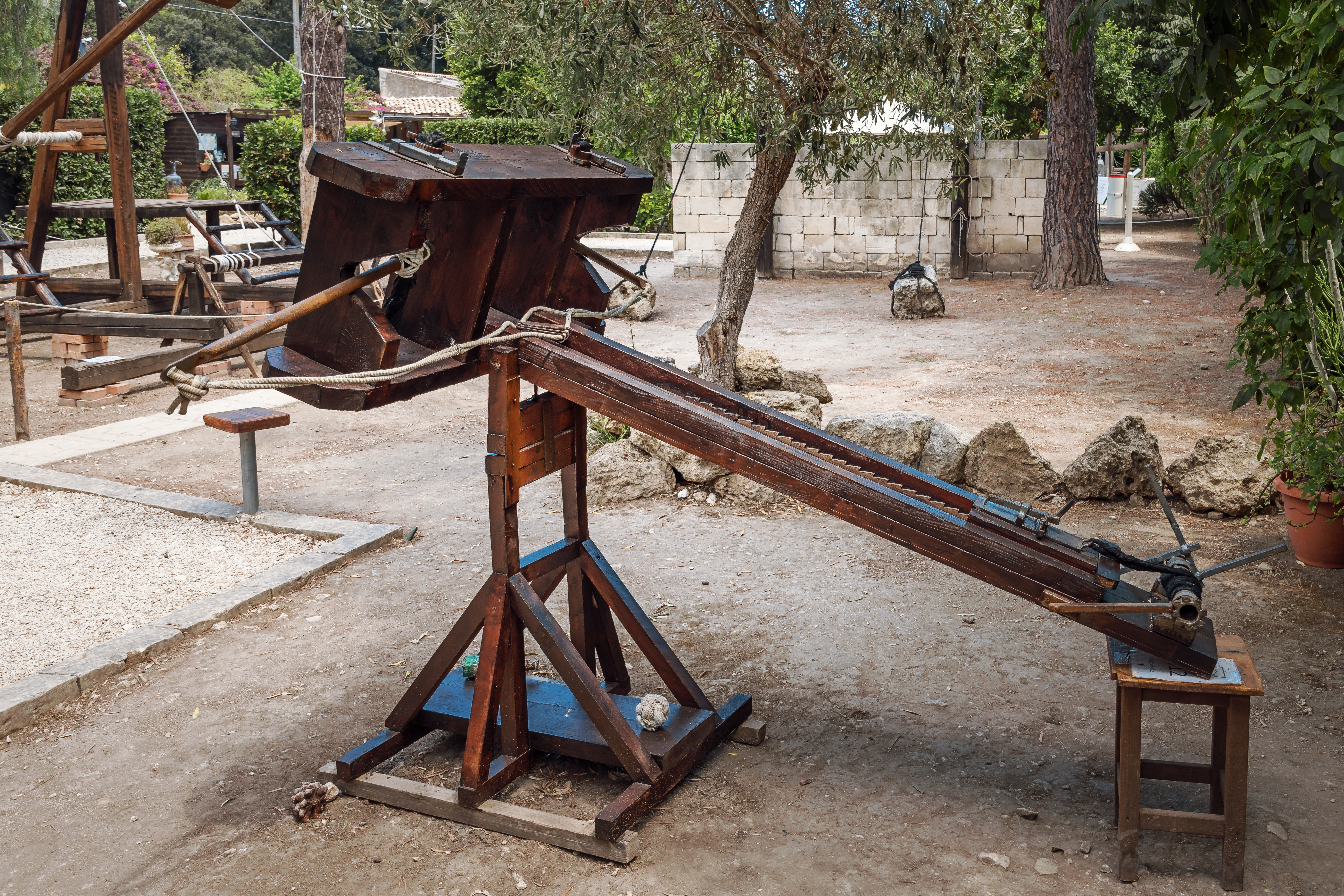 Moderne Rekonstruktion einer Palintonon (Ballista) im Technikpark Archimedes in Syrakus, unweit des Parco Archeologico della Neapoli